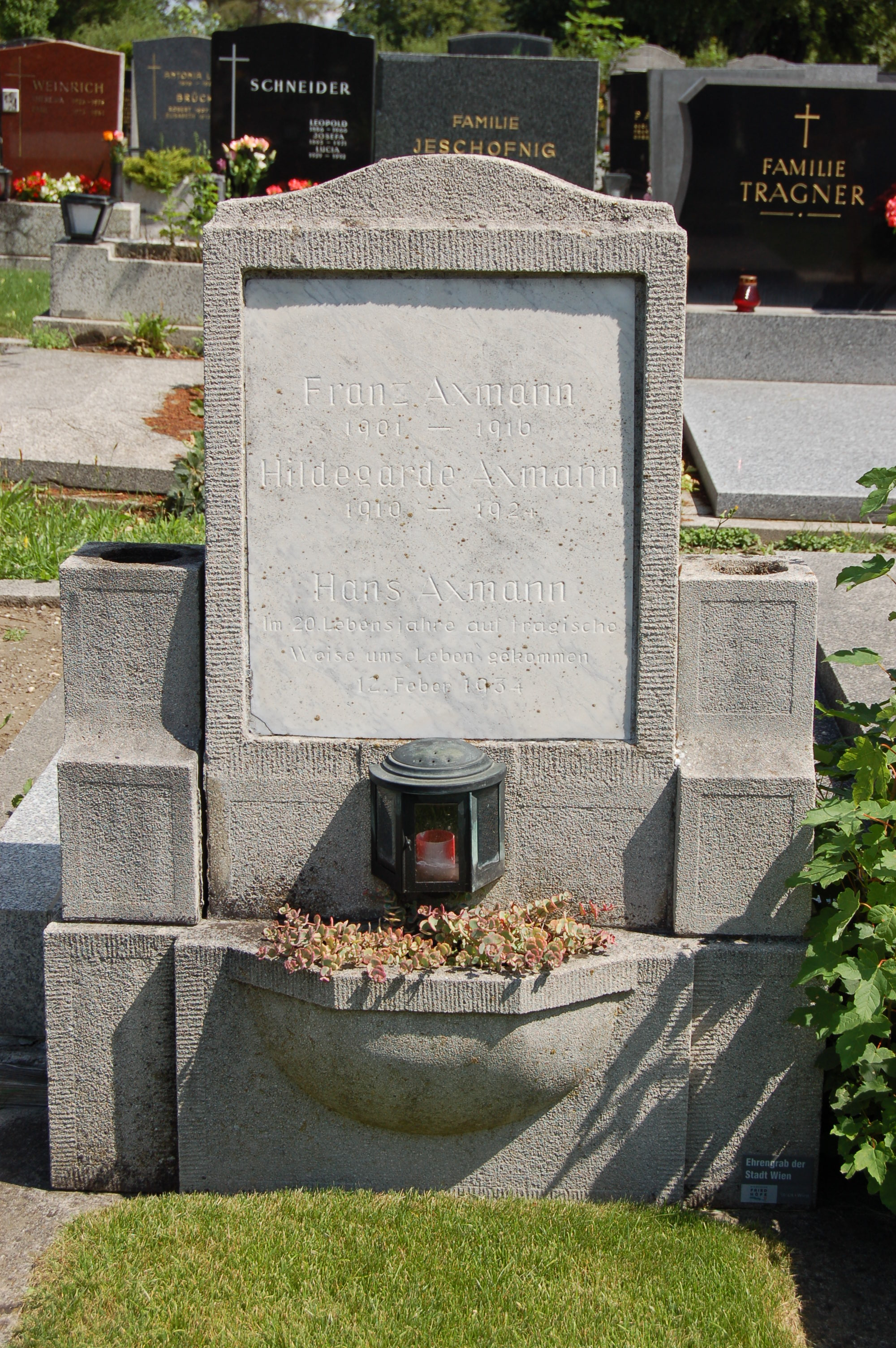 Groß-Jedlersdorfer Friedhof, ehrenhalber gewidmetes Grab von Johann Axmann, Februaropfer